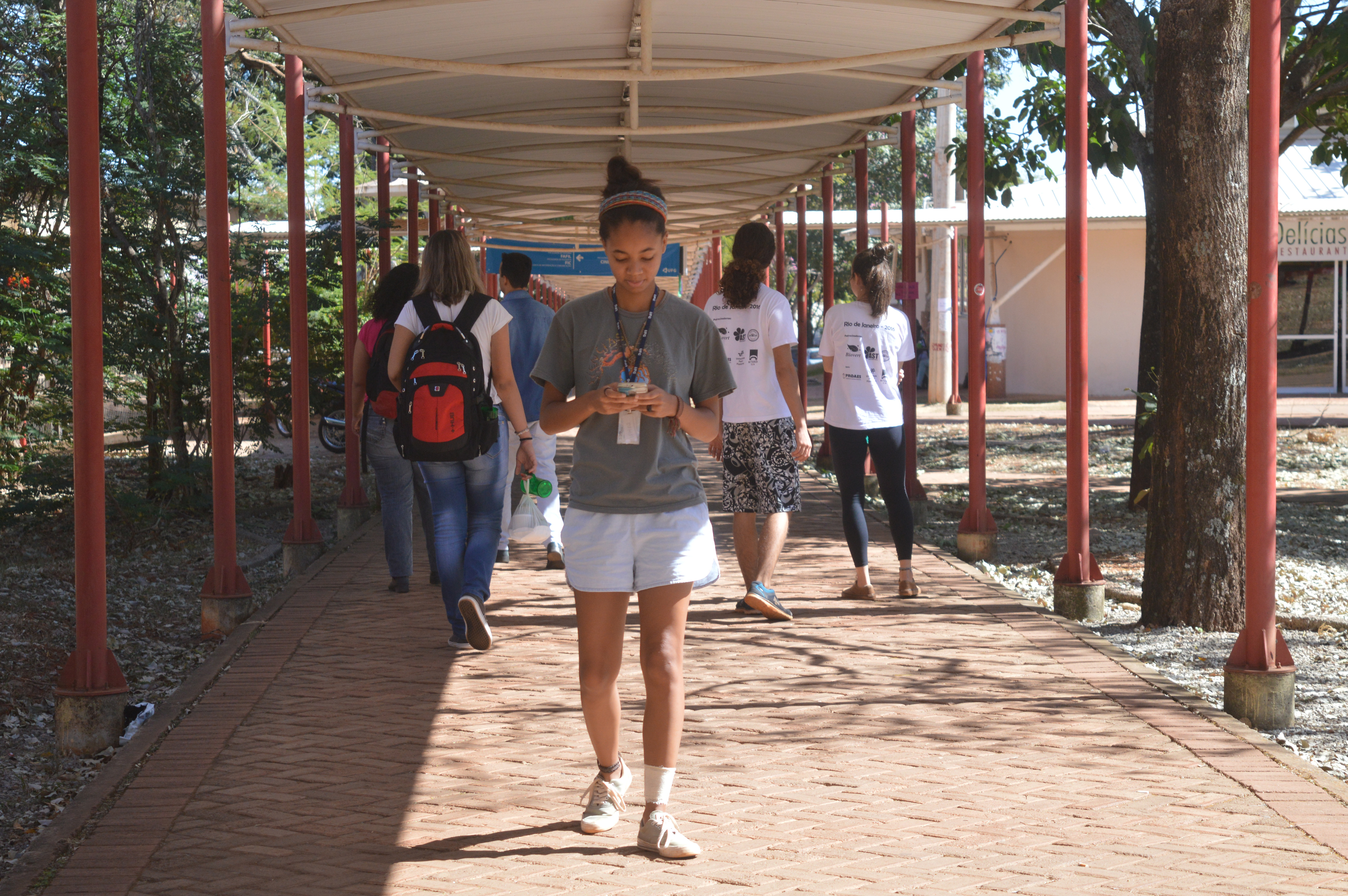 Estudante anda pelos corredores da UFG Samambaia, junho de 2016.